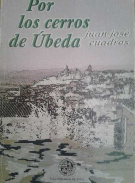 Por los cerros de Úbeda